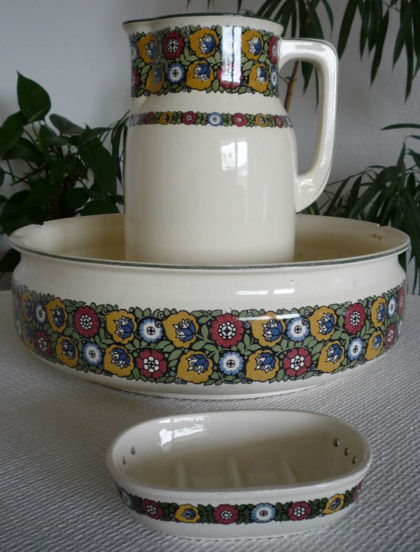 Waschservice von "Villeroy & Boch", Dekor "Drina", bestehend aus Waschschüssel, Waschkrug und Seifenschale (ca. Anfang 20. Jhd.)